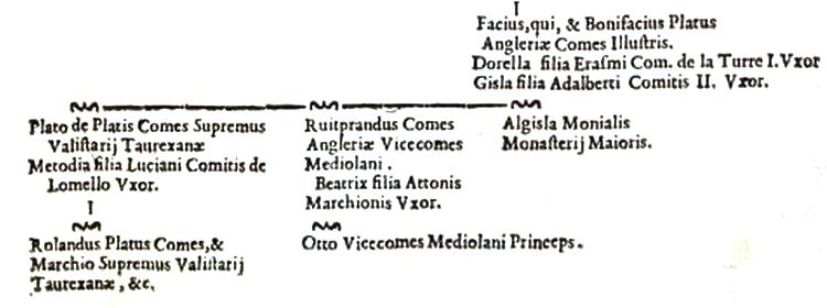 Genealogía de Rolando Platoni, incluye el nombre de sus padres, tíos y abuelos paternos